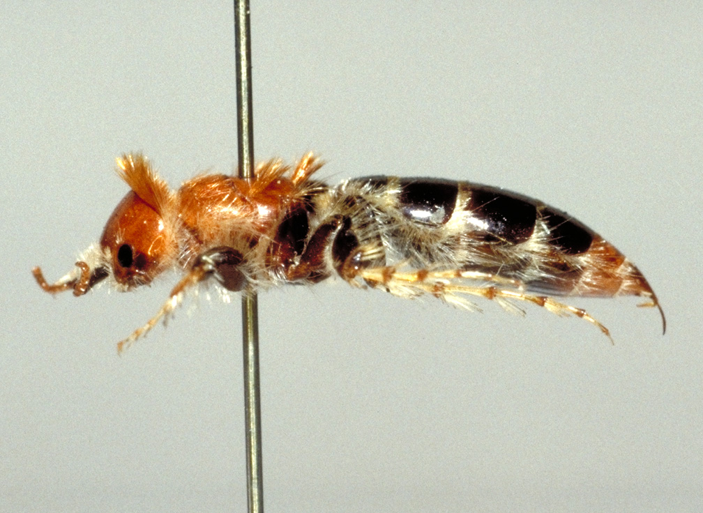 Bradynobaenus spec. female (Rio Negro) Bradynobaenidae